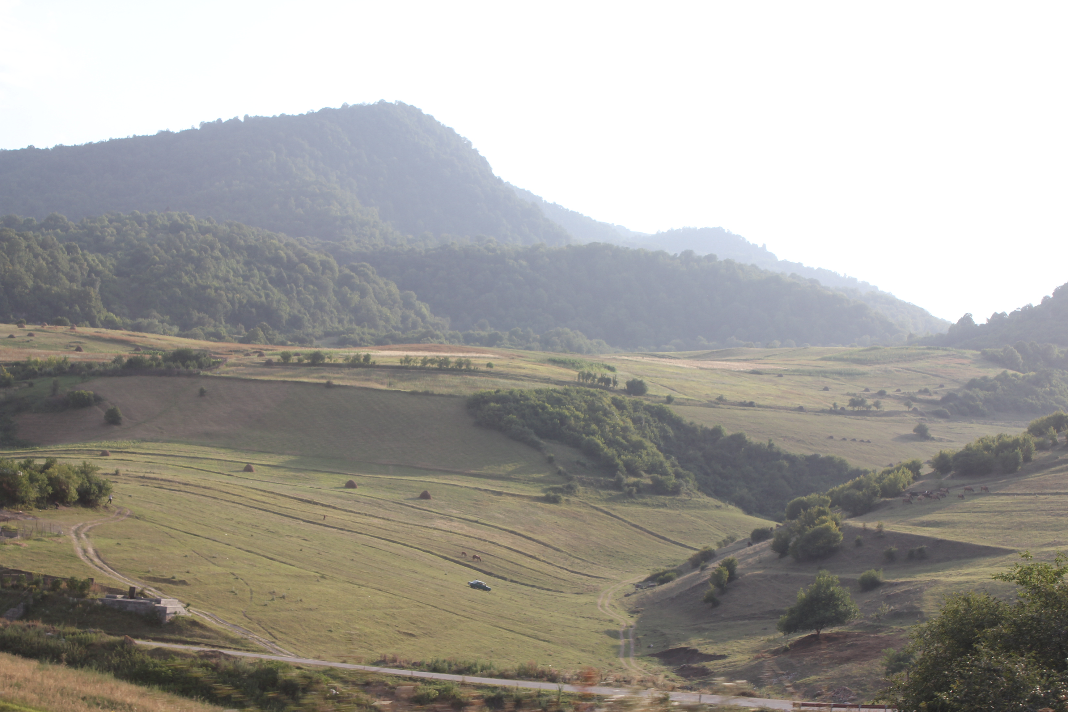 Окрестности монастыря Макараванк, область Тавуш